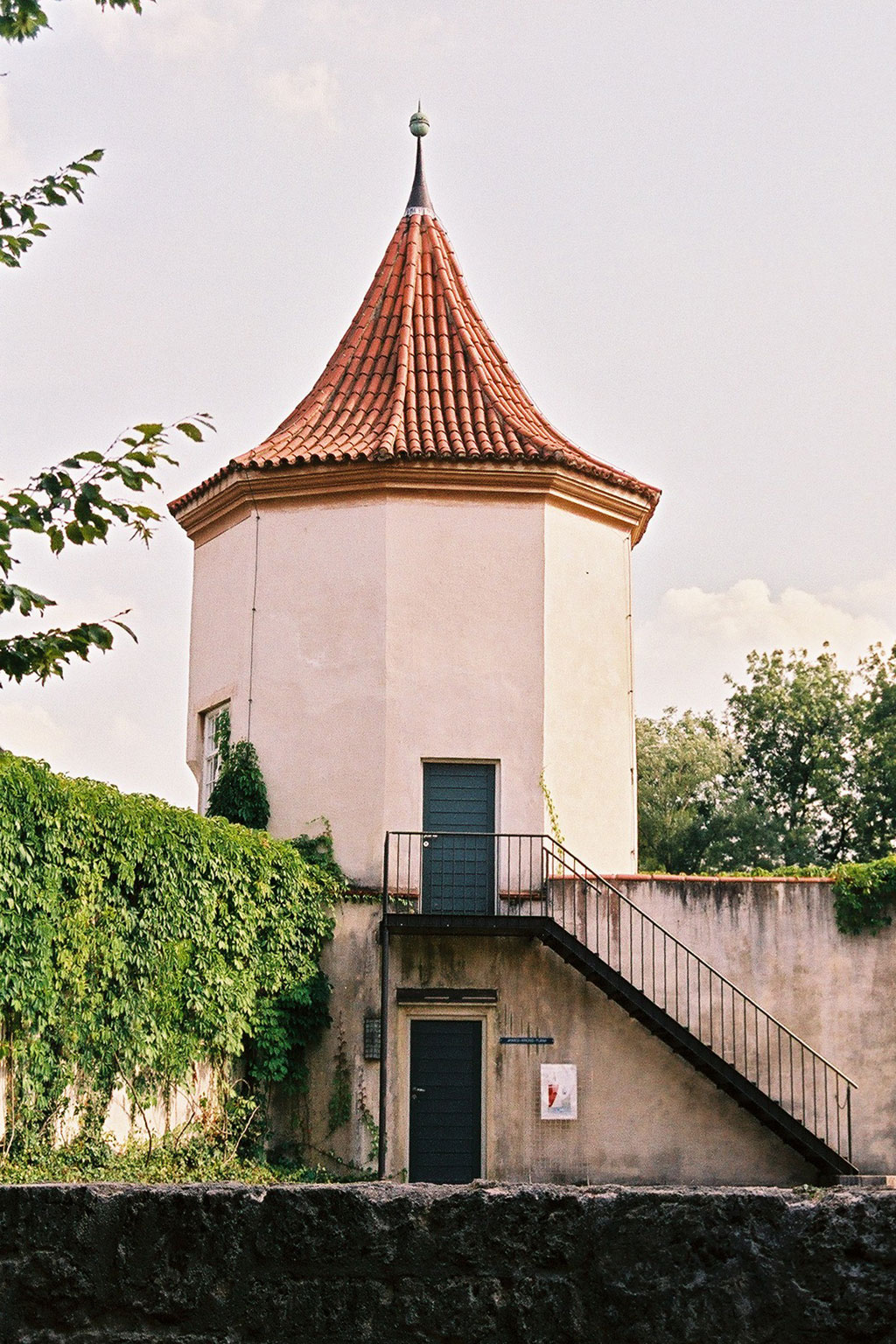 Blutenburg, Munich Watchtower